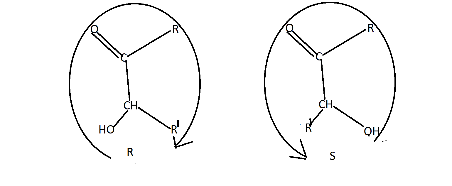 R,S-ізомерія ацилоїнів. Спостерігач диветься з протилежного від атома гідрогена(наймолодшого замісникв) боку, томі він зображений разом з карбоном. Якщо послідовність OH, CO-R, R` (спадання старшинства) йде за годинниковою стрілкою, то це R-ізомер, якщо проти годинникової - то S-ізомер.